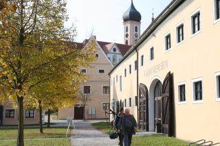 Schwäbisches Volkskundemuseum Oberschönenfeld